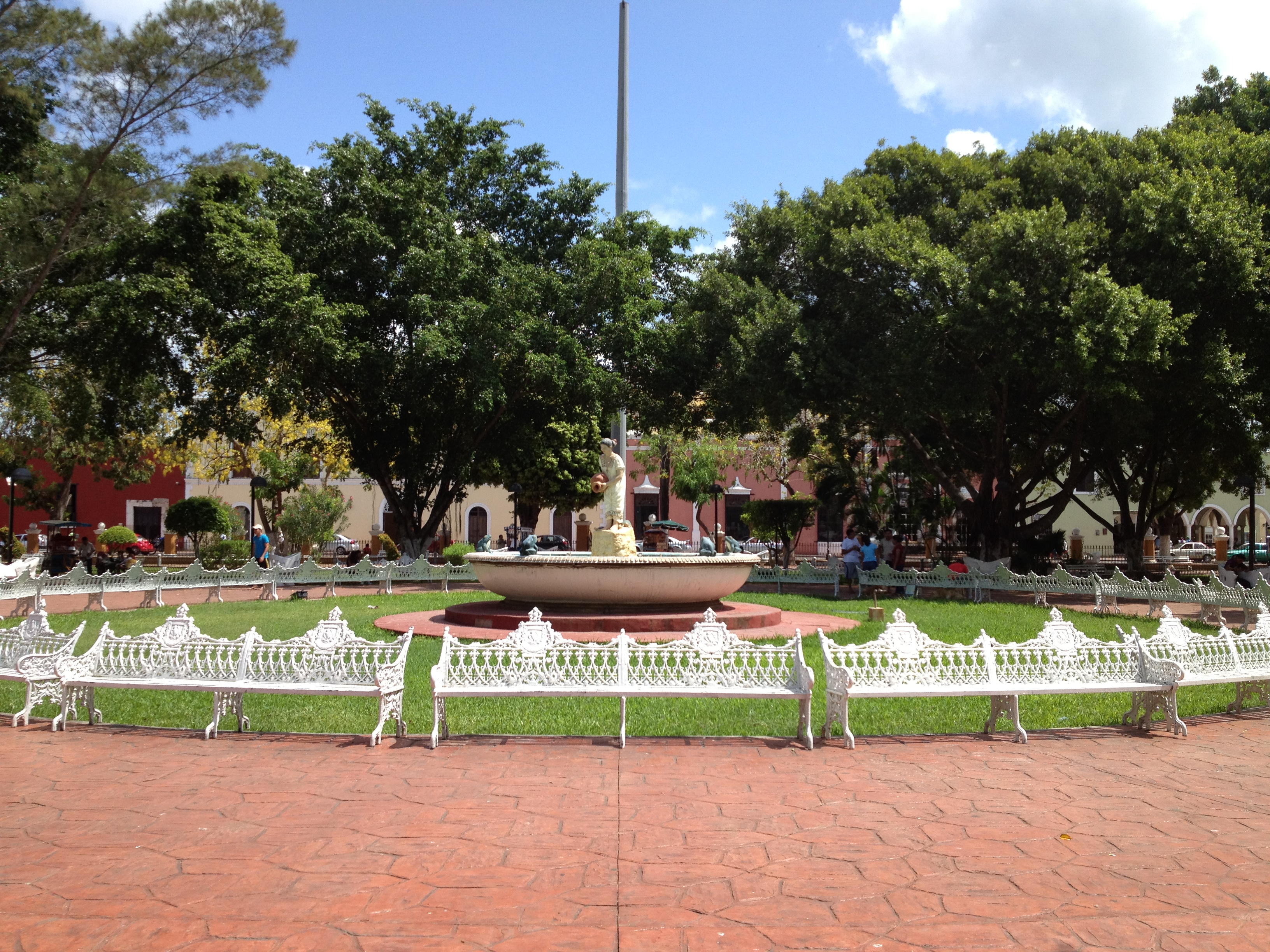 Fuente de la Plaza Principal de Valladolid Yucatan